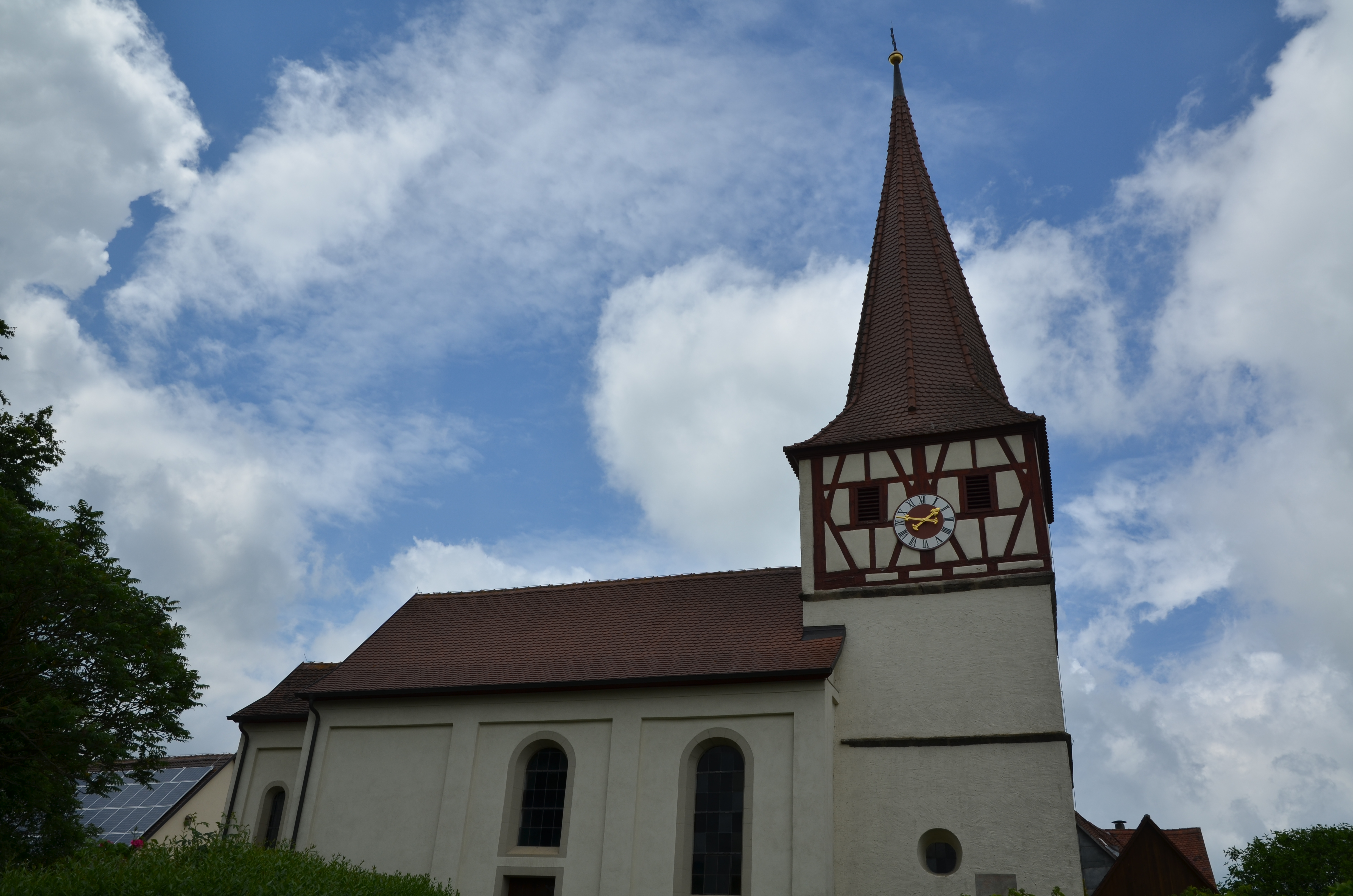 evang.-luth. Heilig-Kreuz-Kirche in Cadolzhofen